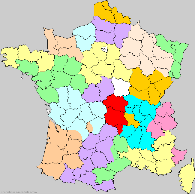 France 1919 - Carte des régions économique Clémentel